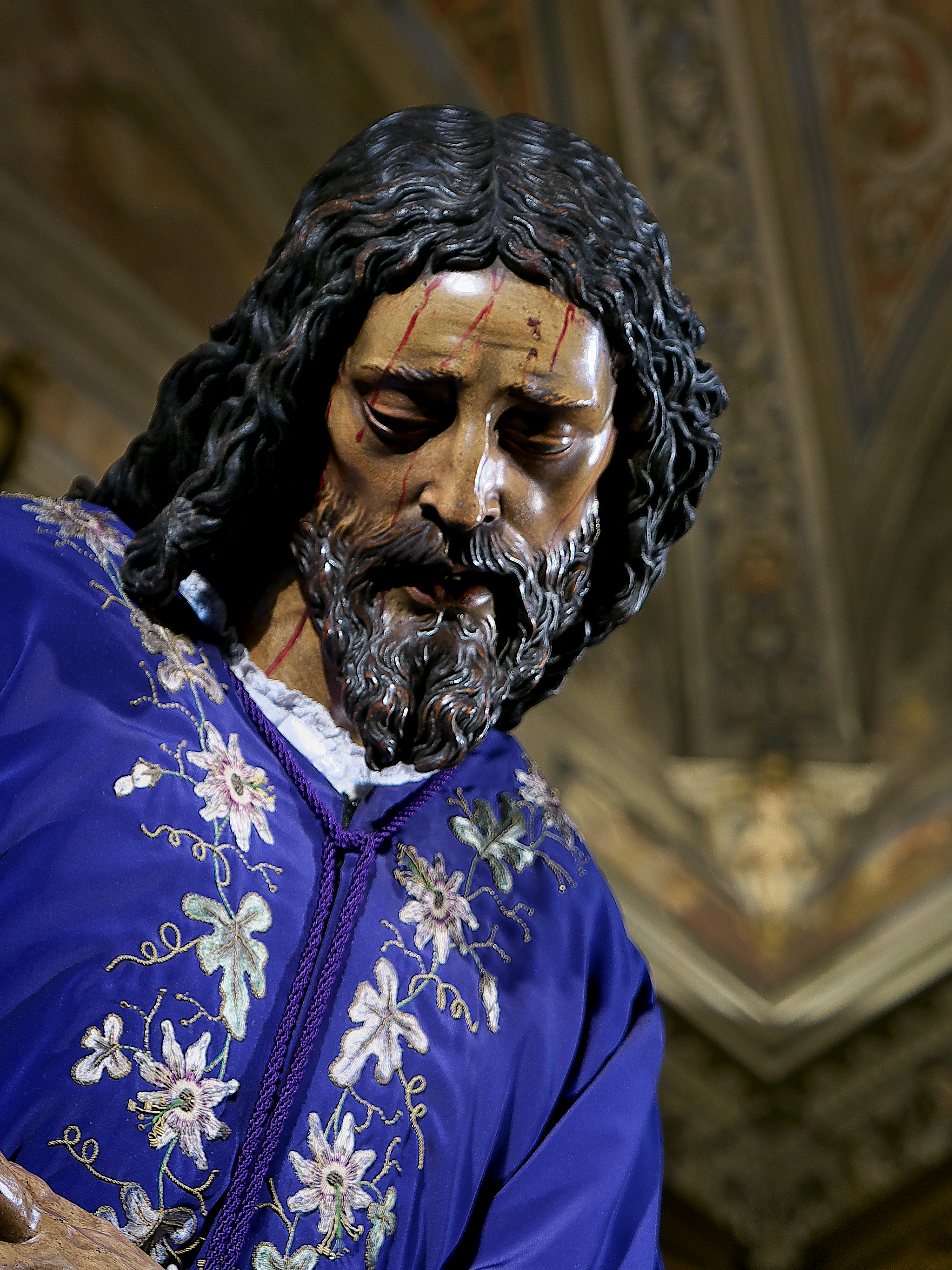 Juan Martínez Montañés legó a Sevilla y a la Historia del Arte Universal, el rostro mas perfecto y humano, por su naturalismo, de Jesús en su Pasión.